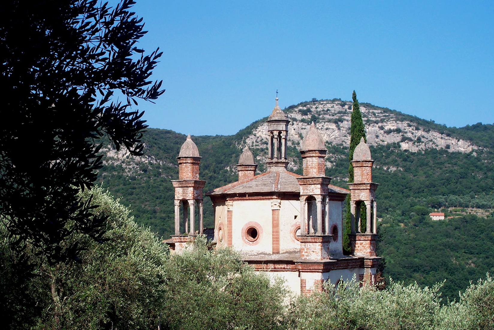 Église des Cinq Campaniles de la zone monumentale de Perti à Finalborgo (Ligurie)